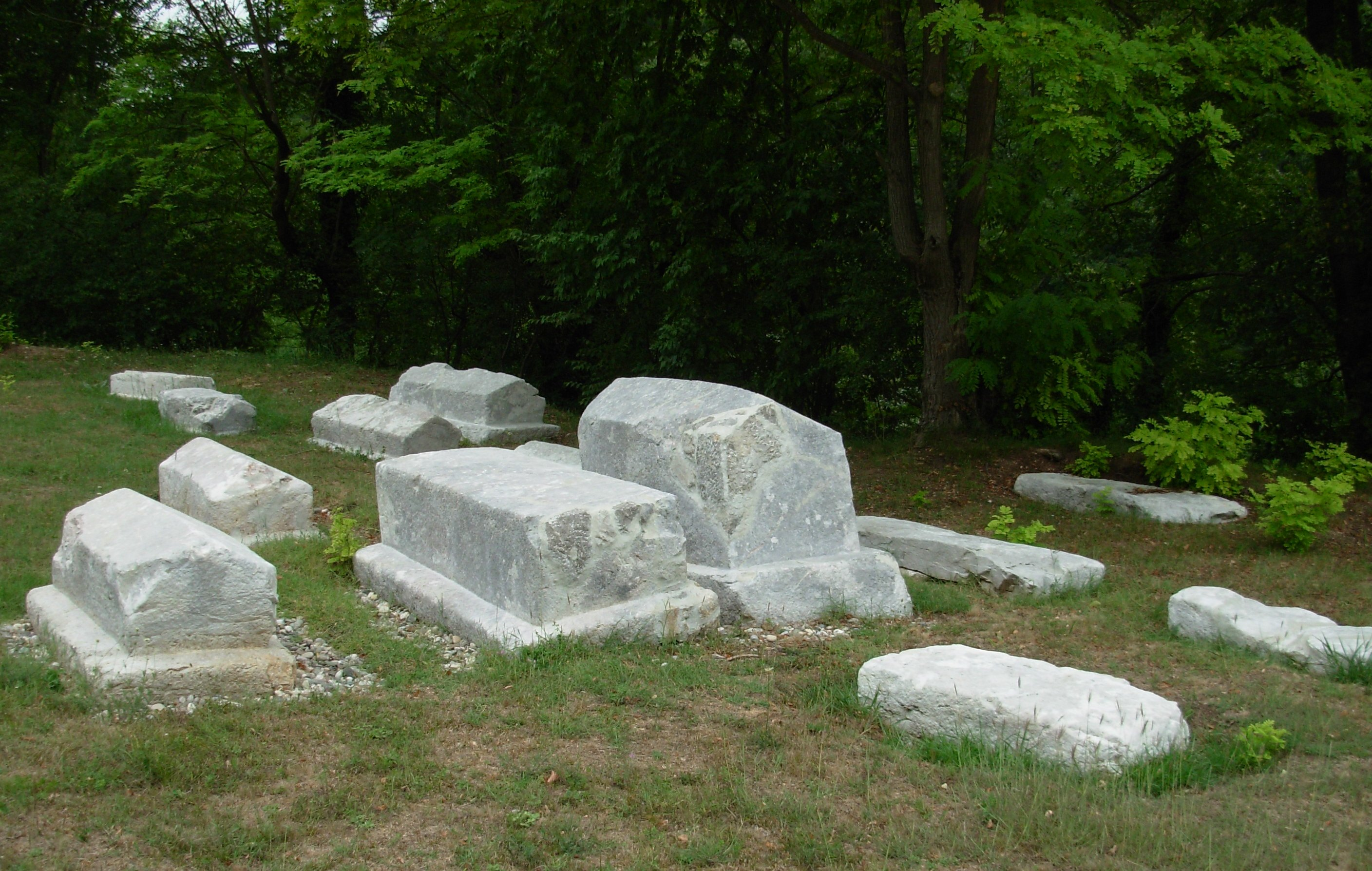 Mramorje, Perućac, Srbija. Slikao Goldfinger